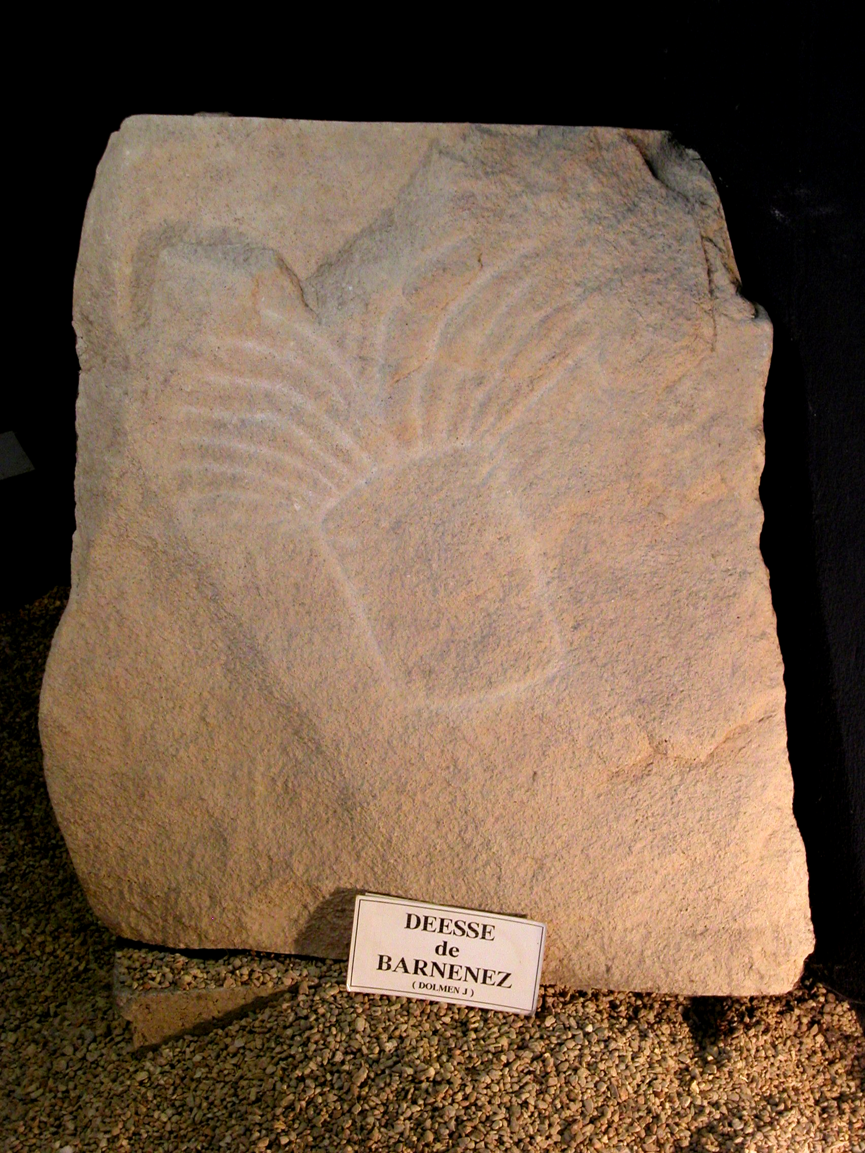 Nachbildung einer Felsritzung von Barnenez